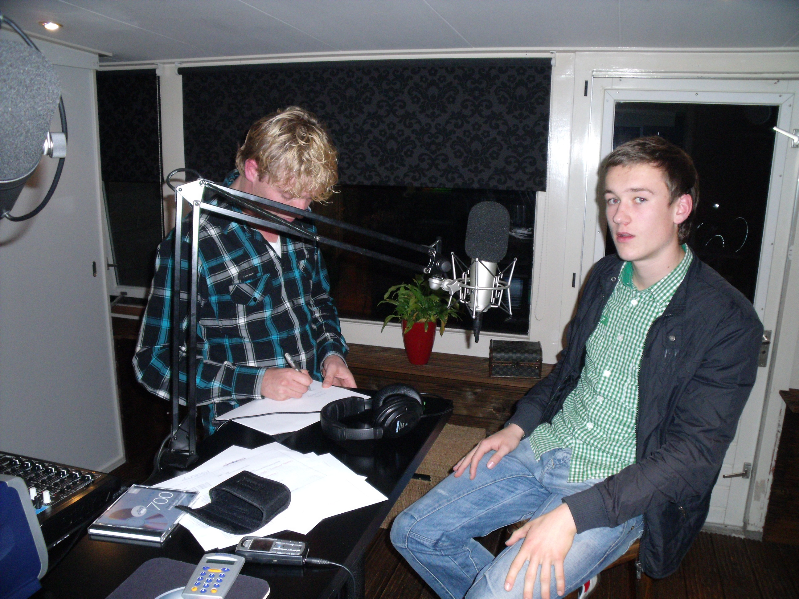 Mike te Wierik bij het plaatselijke radioprogramma voor Hengevelde "wegdam weekend"